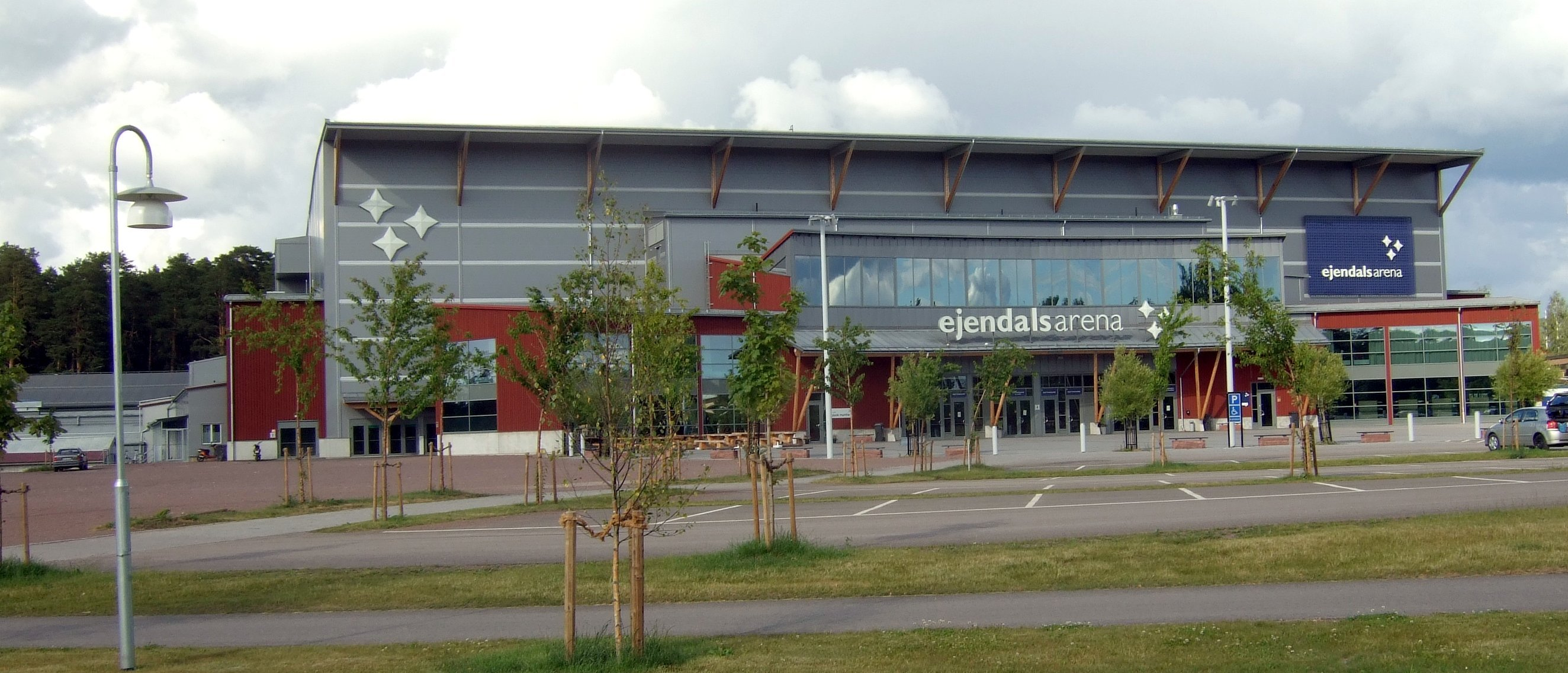 Ejendals Arena, Leksand, Sweden